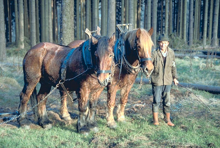 Rückepferde – Kaltblüter eingespannt im Einsatz im Siebengebirge; Bei der Forstwirtschaft im Siebengebirge werden umweltfreundlich auch umweltfreundliche eingesetzt